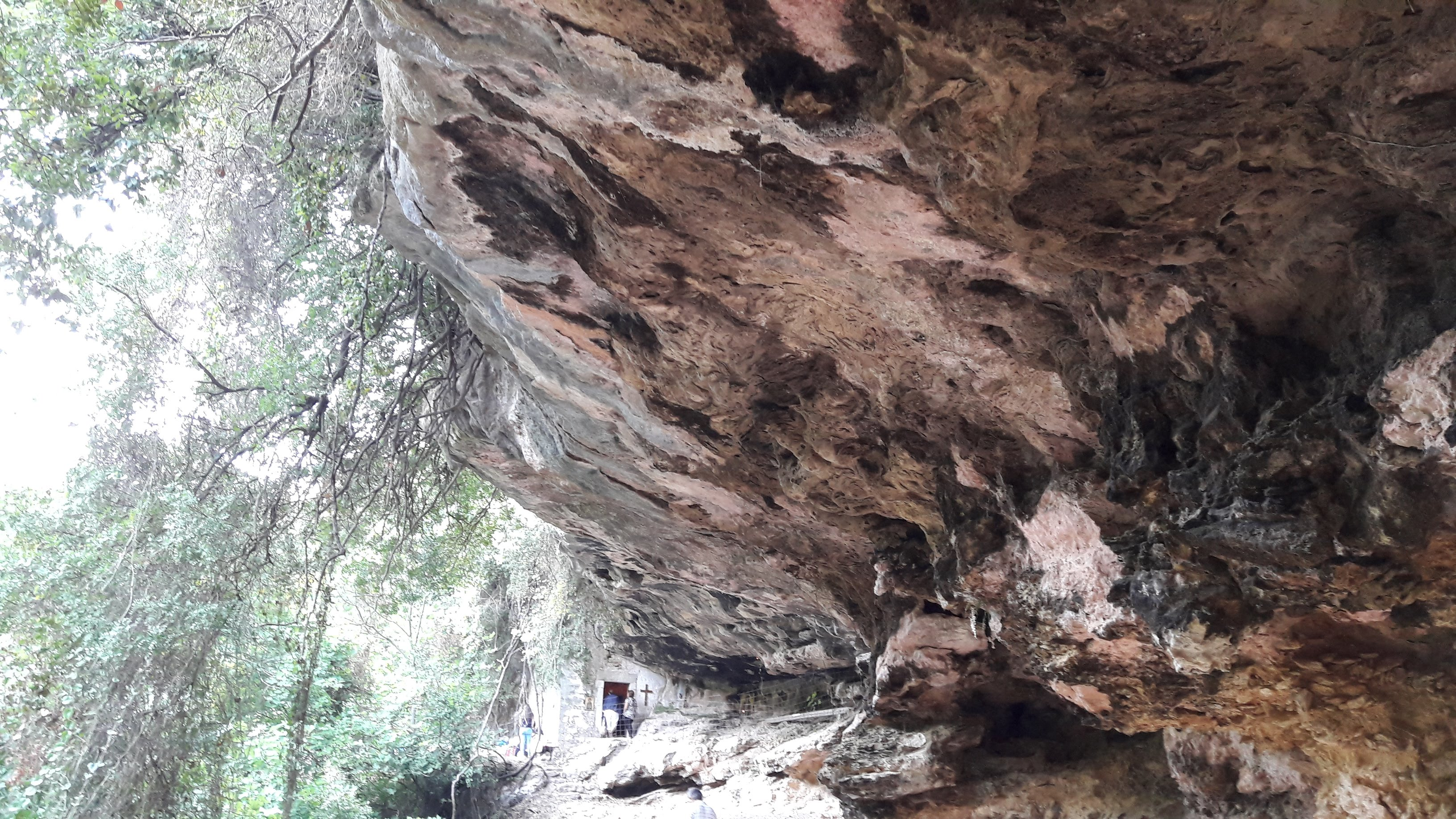 Αγία Παρασκευή, εξωκλήσι στο Καλανταριανό φαράγγι